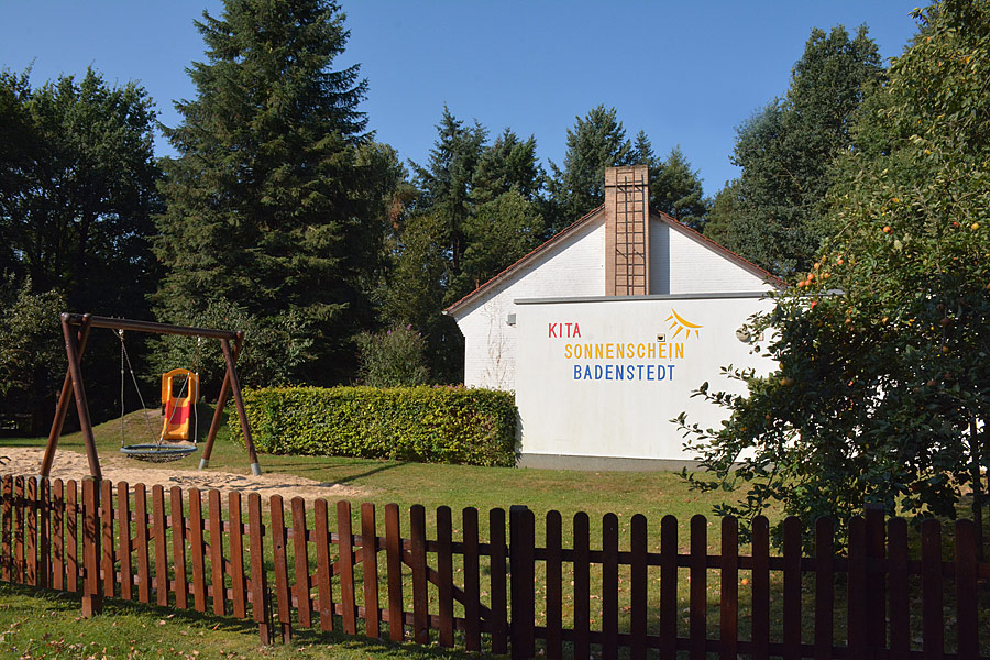 Badenstedt Kita Sonnenschein